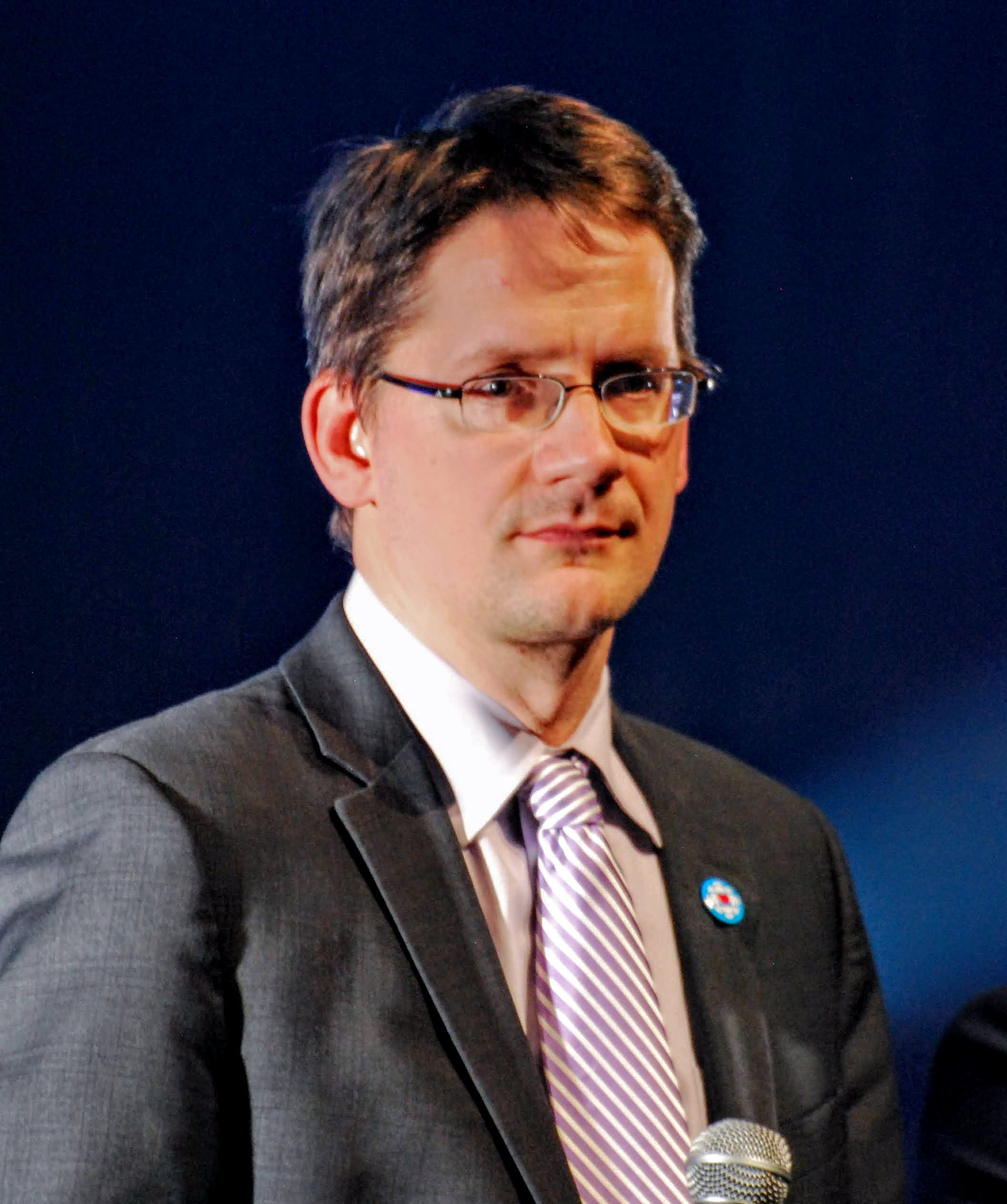 Spectacle de soutien à la Société Radio-Canada tenu à la salle François Brassard du Cégep de Jonquière le 8 octobre 2014. Sylvain Gaudreault.